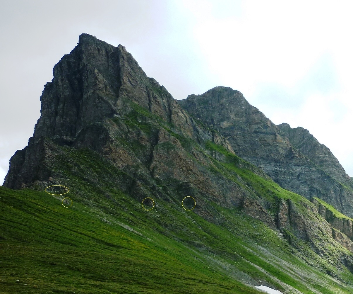 Felskavernen Safierberg, Safierberg GR, Schweiz